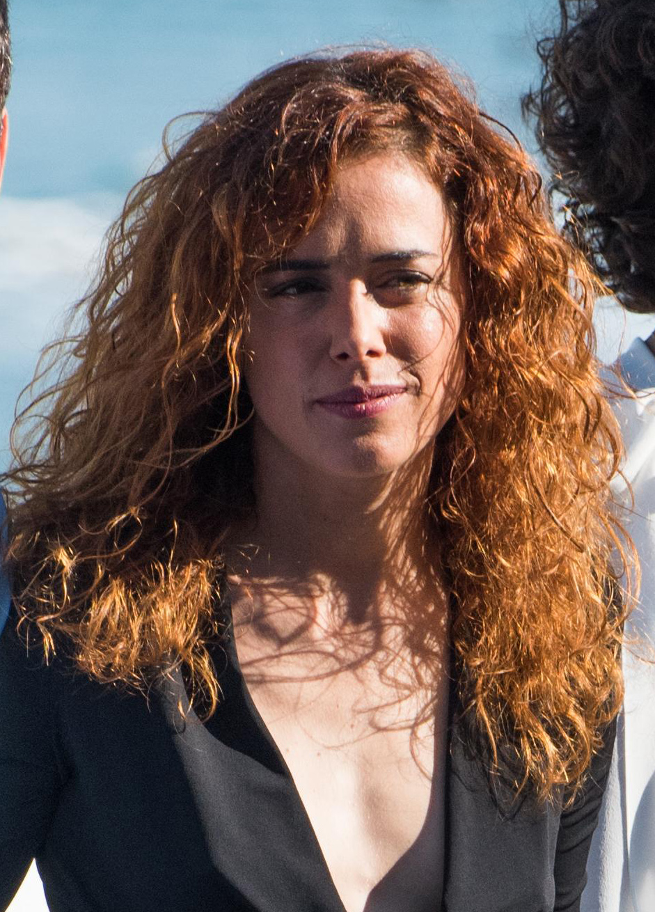 Patricia López Arnaiz en el festival de cine de San Sebastián de 2017.